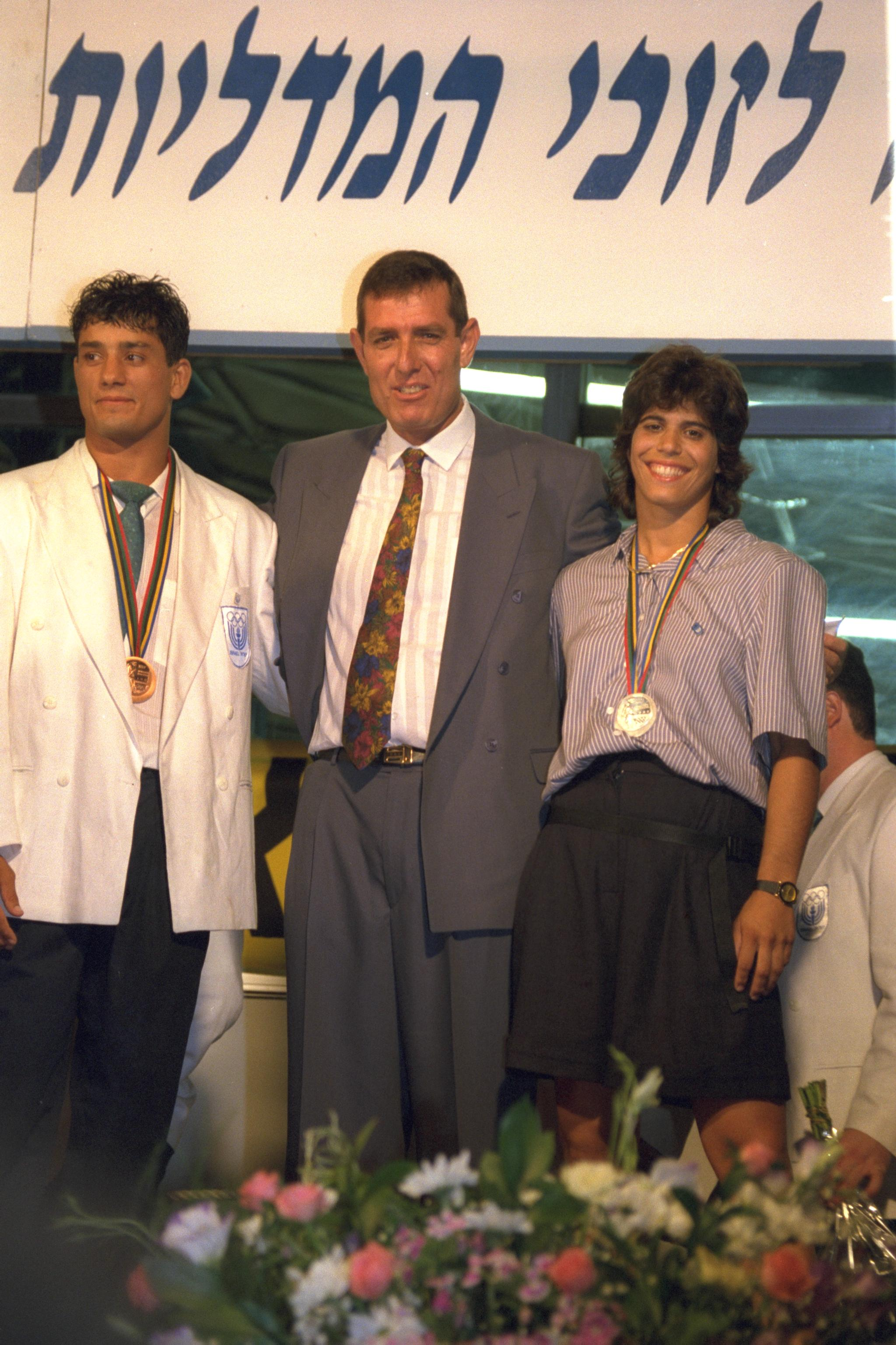 Barcelona Olympic Medalists Oren Smadja and Yael Arad pose with the Deputy Education Minister, M.K. Micha Goldman. זוכי המדליות האולימפיות של אולימפיאדת ברצלונה אורן סמדג'ה ויעל ארד עם סגן שר החינוך, ח"כ מיכה גולדמן. Photo: KOREN ZIV, 10/08/1992.